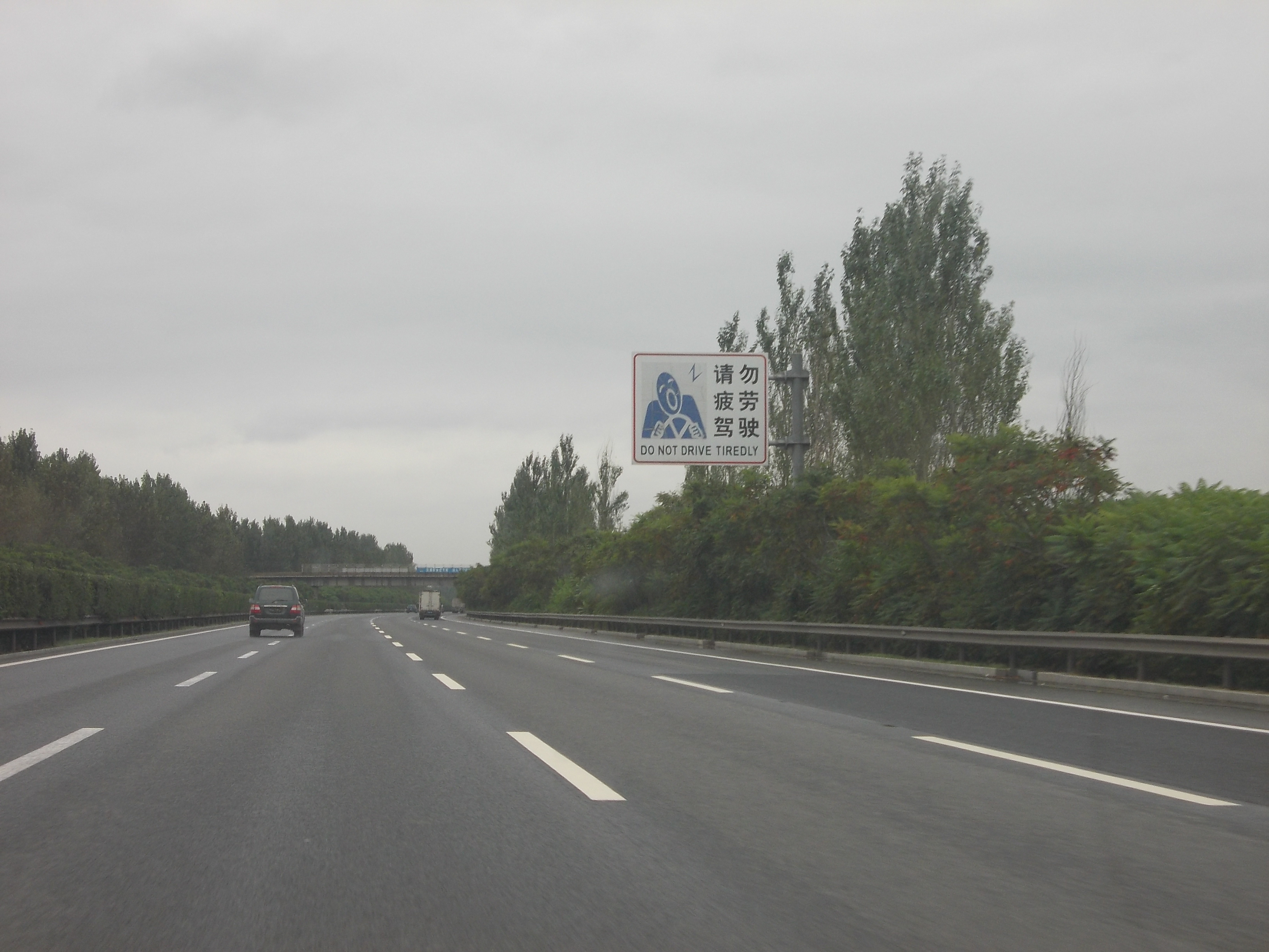 沈大高速公路, 圖形化告示牌.